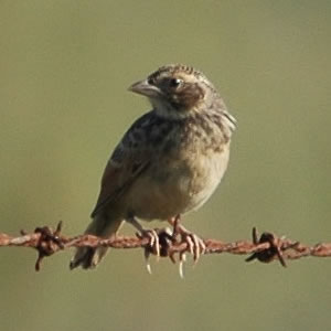 Bird, Australasian Bushlark, Mirafra javanica